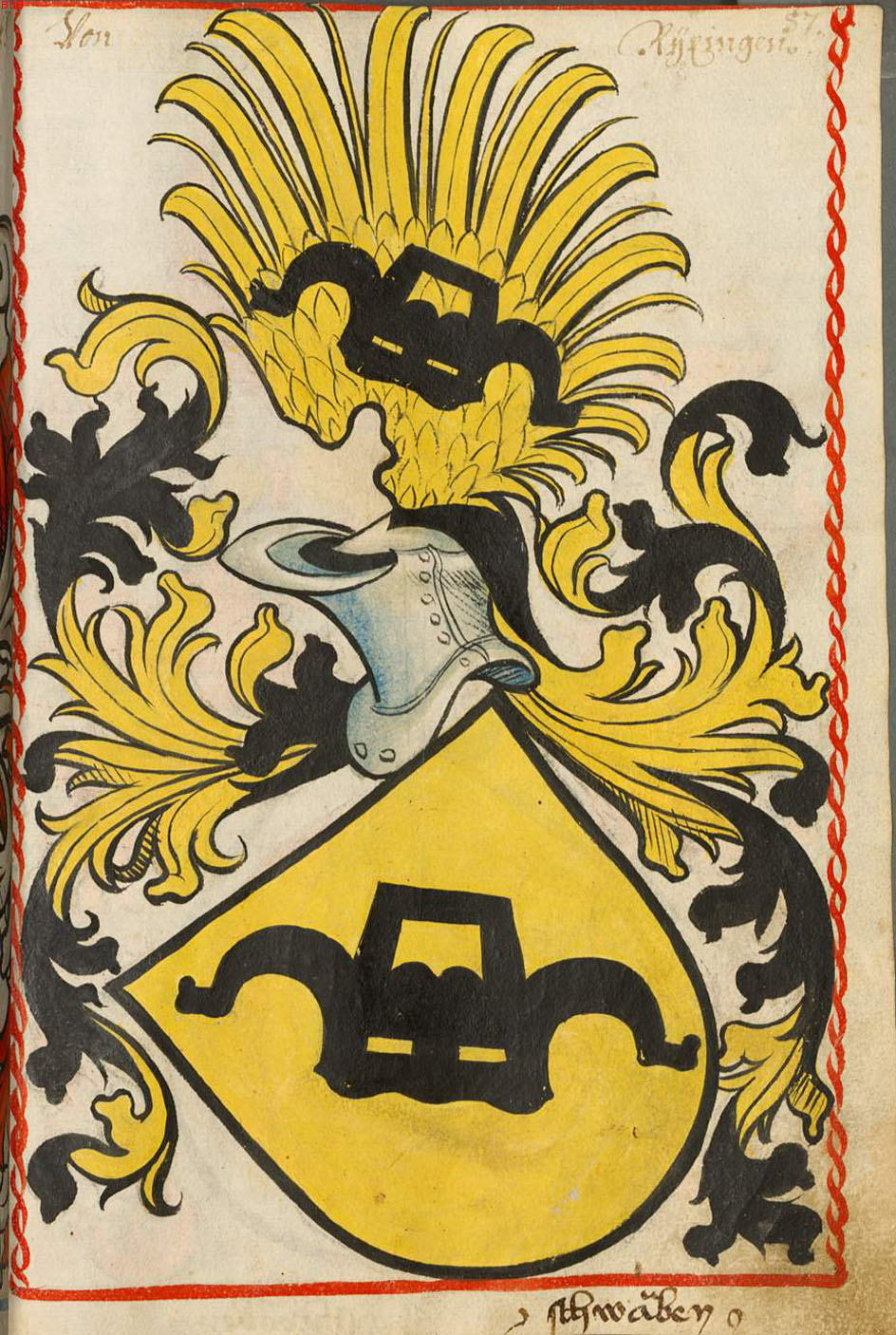 Scheibler'sches Wappenbuch, älterer Teil; Seite 57 Von Ryxingen Schwaben